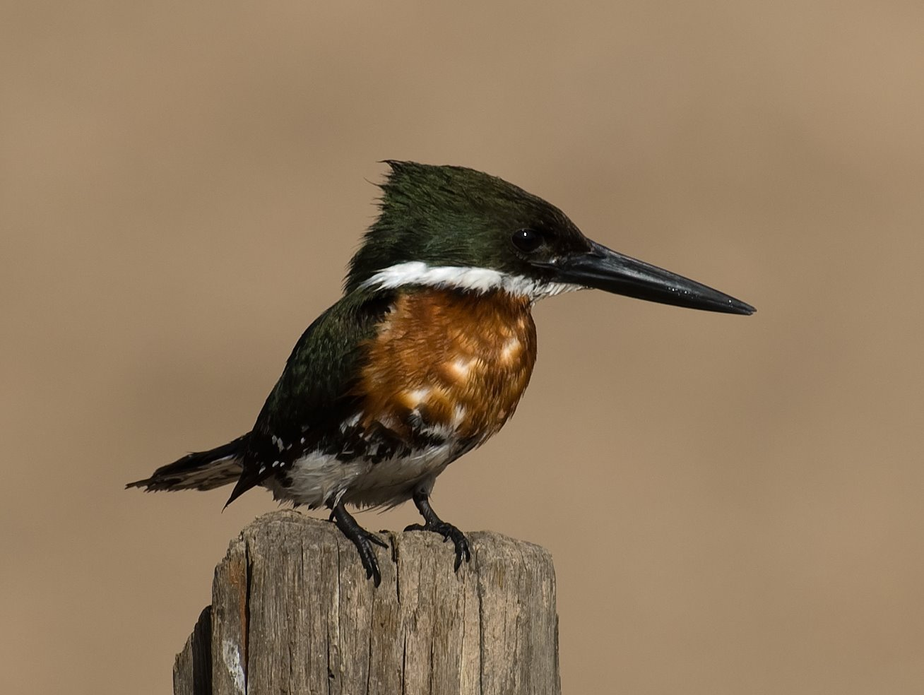 MARTIN_PESCADOR, Chloroceryle amazona, male